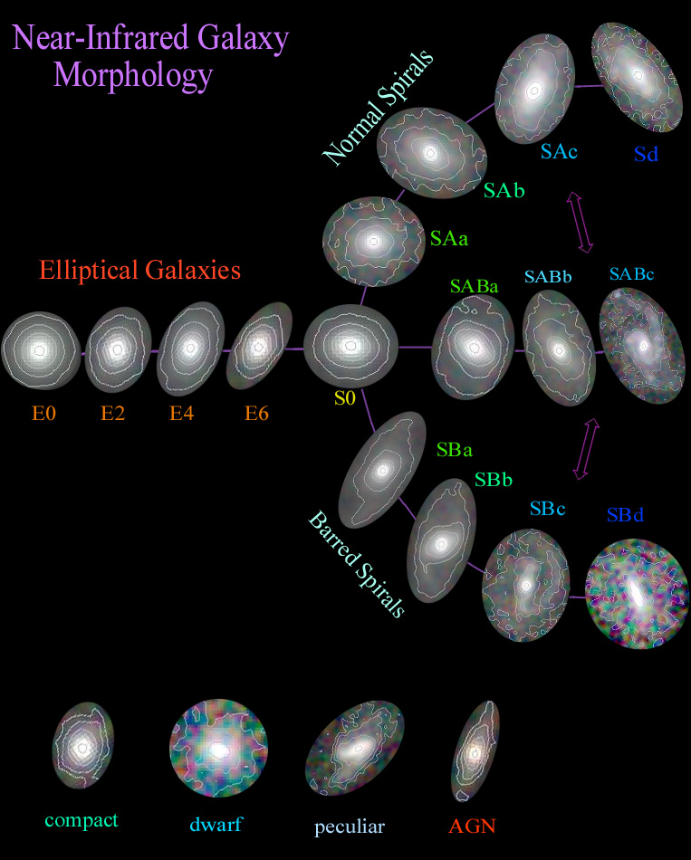 Galaxy morphology diagram